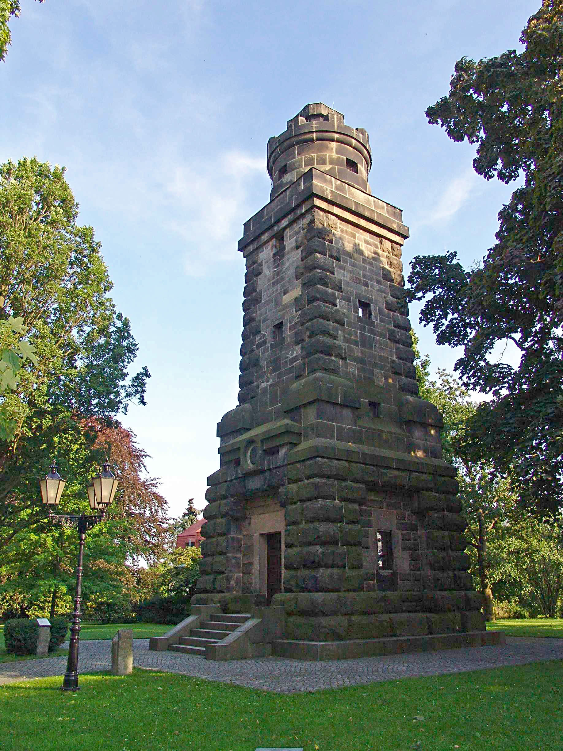 Bismarckturm in Neugersdorf, Landkreis Görlitz, Sachsen